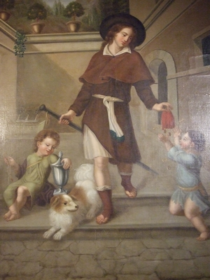 Das Gemälde zeigt eine Episode aus der Vita des Hl. Rochus. Es wurde von Louise Seidler nach einer Skizze Goethes angefertigt. Es befindet sich heute in der Grabkapelle des Erbauers der neuen Rochuskapelle, Pfarrer Engelhardt. Vermerk von 1819: “Das Gemälde St. Rochus wurde vom Großherzoglichen Hof in Sachsen-Weimar angeliefert. Es ist von einem lutherischen adeligen Fräulein namens Luise Seidler gemalt worden. Der Name steht auf der Seite des Bildes neben den Worten ‘Ex Voto’. [zitiert nach Krasenbrink/Redenius: Goethes Reisen an den Mittelrhein, hrsg. von der St. Rochusbruderschaft, Bingen]